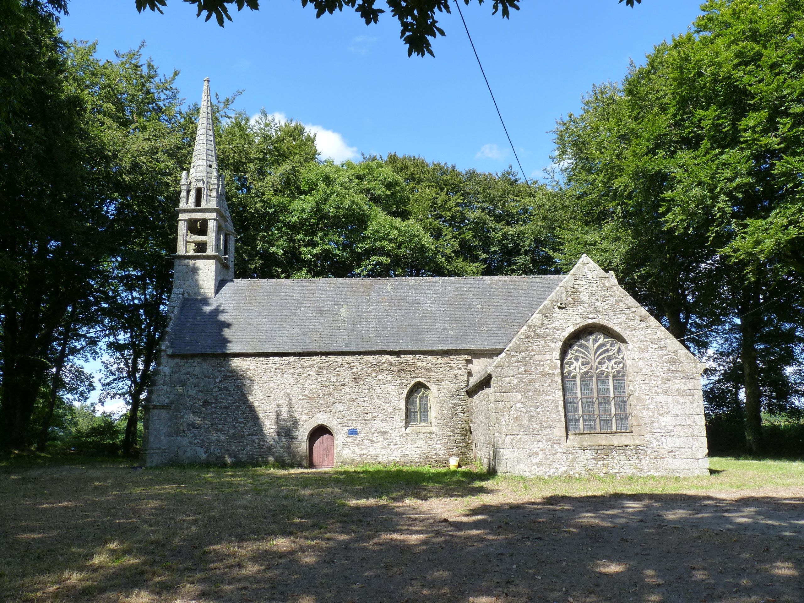 Chapelle du 16ème siècle